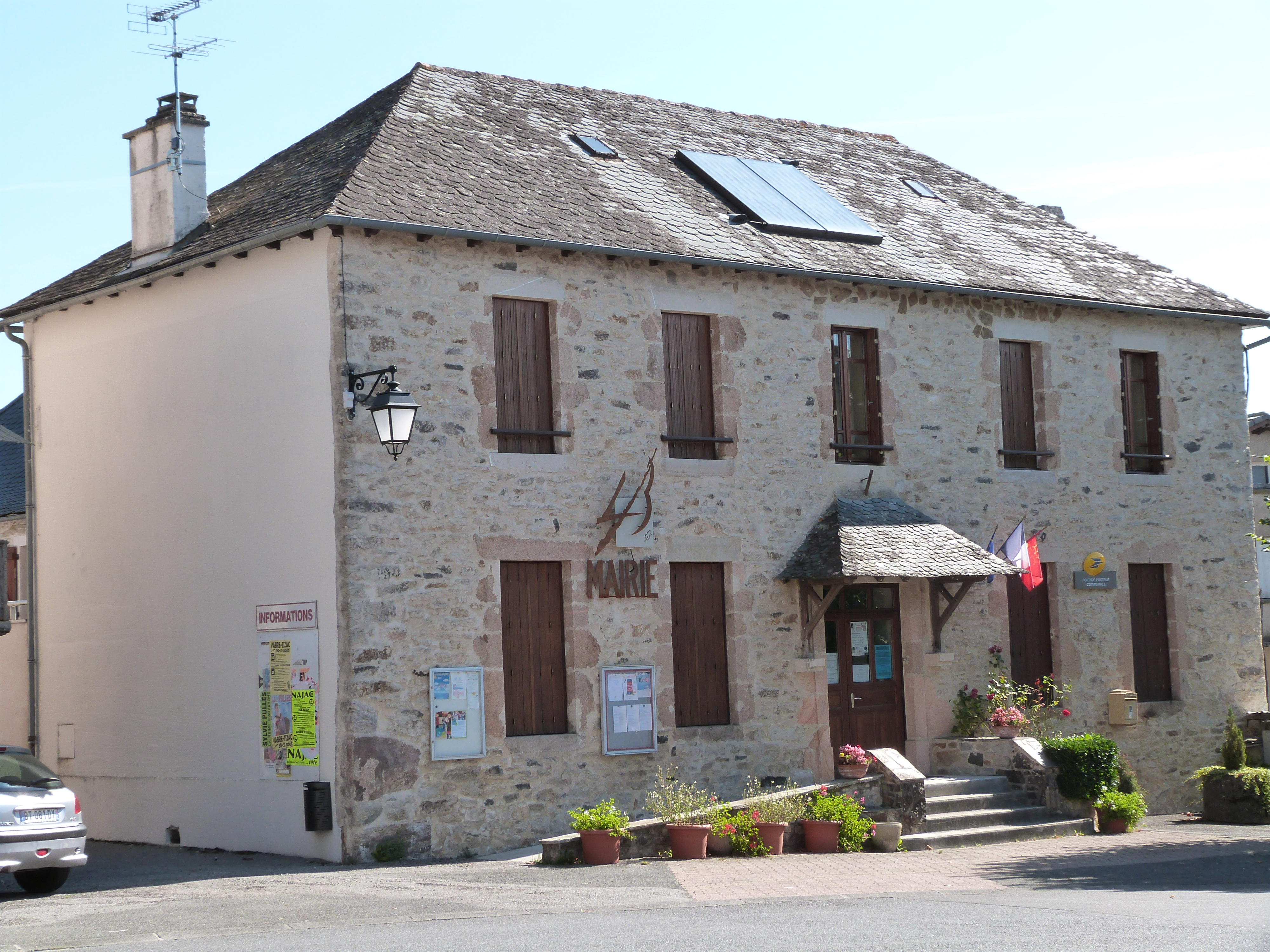 Façade de la mairie de la Capelle-Bleys